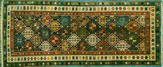 Gadim Ganja carpet in V&A